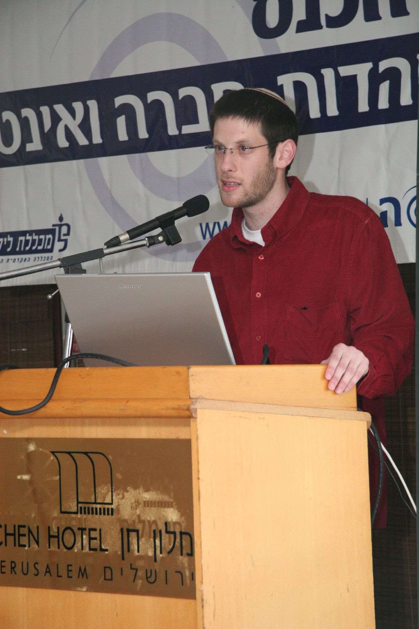 בעז נכטשטרן, עורך כיפה